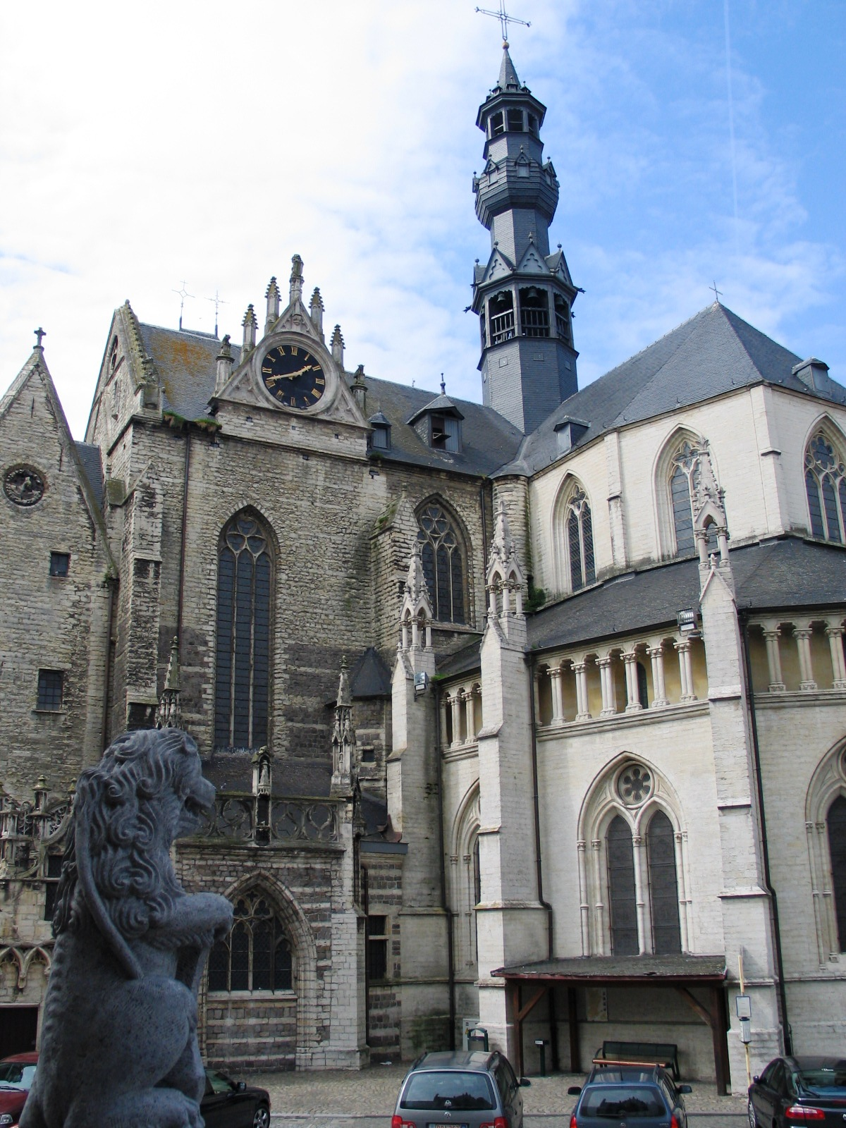 Sint-Leonarduskerk in Zoutleeuw, Belgium